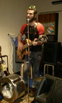 O Leo i Arremecághona! en concerto no centro social En Pé de Pontevedra